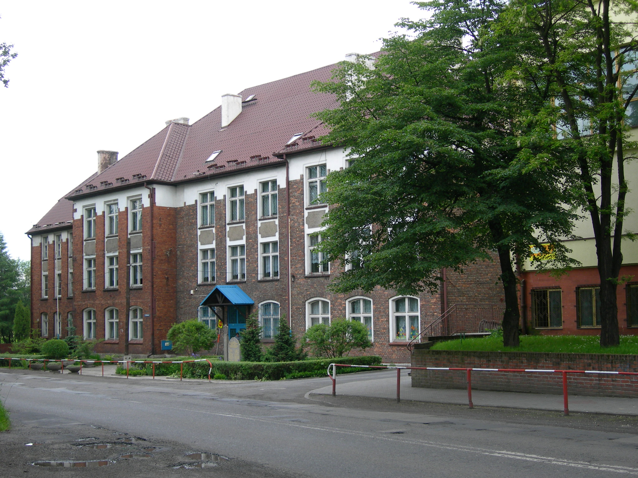 Szkoła podstawowa i gimnazjum w Czuchowie. 2005